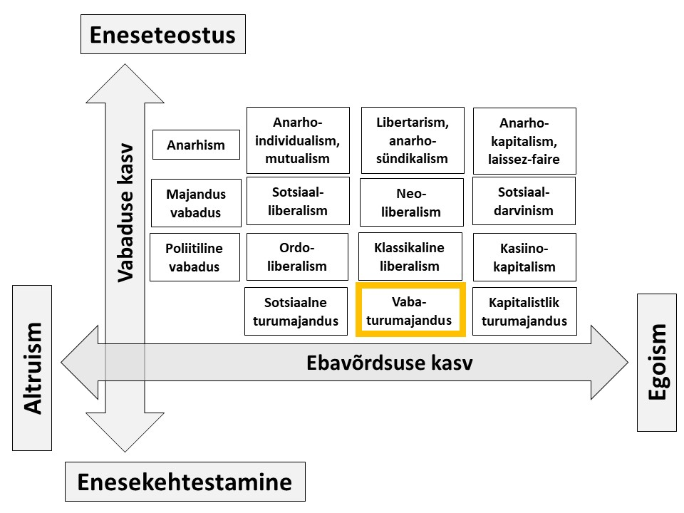 Turumajanduse lahendus